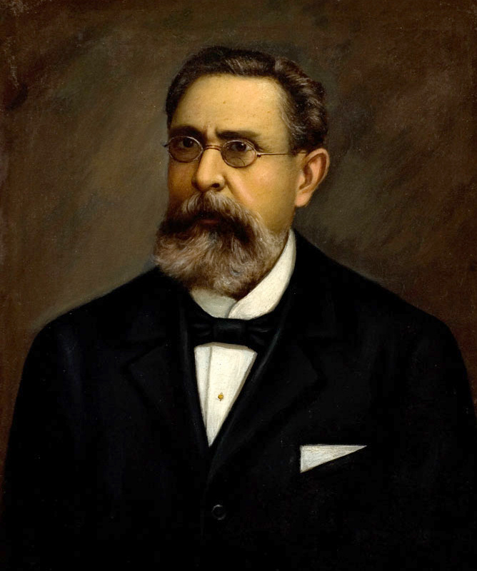 Emilio Estrada Carmona (May 28, 1855 – December 21, 1911)